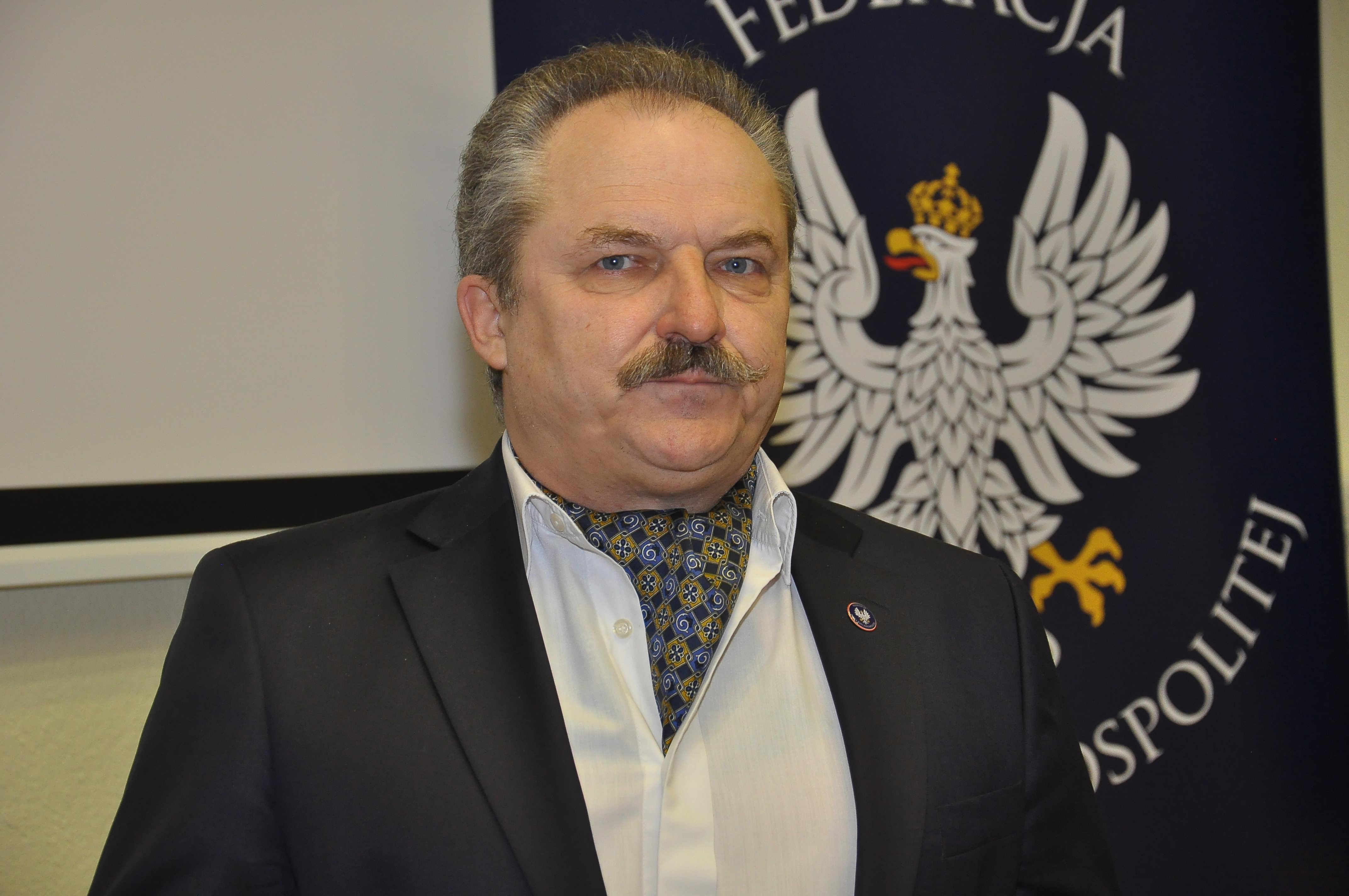 Prezes Federacji dla Rzeczypospolitej Marek Jakubiak Poseł na Sejm Rzeczpospolitej Polskiej